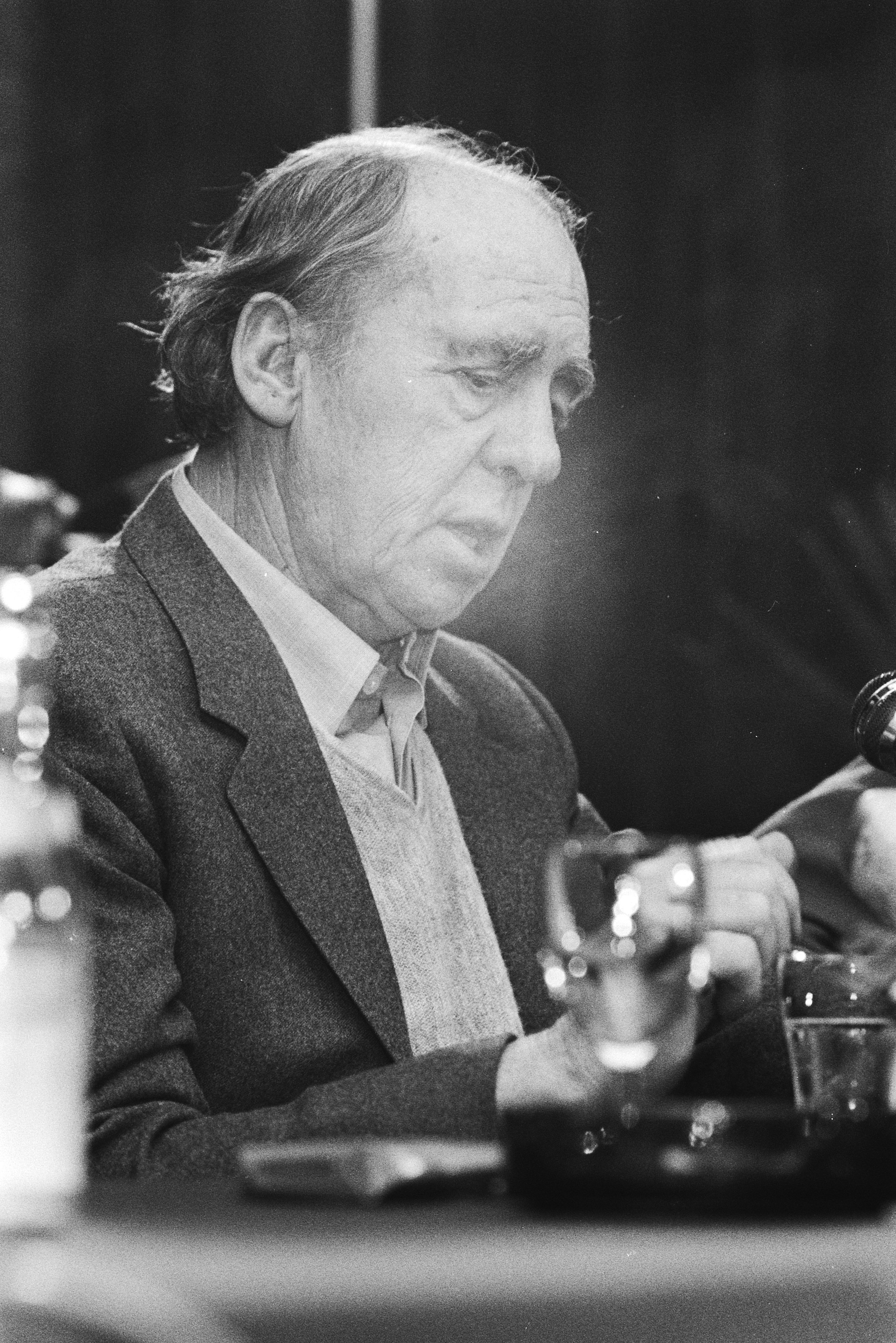 Collectie / Archief : Fotocollectie Anefo Reportage / Serie : Duitse schrijver Heinrich Böll geeft een persconferentie in Heerlen Beschrijving : Heinrich Böll leest voor Datum : 26 maart 1983 Locatie : Heerlen, Limburg Trefwoorden : persconferenties, portretten, schrijvers Persoonsnaam : Böll, Heinrich Fotograaf : Antonisse, Marcel / Anefo Auteursrechthebbende : Nationaal Archief Materiaalsoort : Negatief (zwart/wit) Nummer archiefinventaris : bekijk toegang 2.24.01.05 Bestanddeelnummer : 932-5457